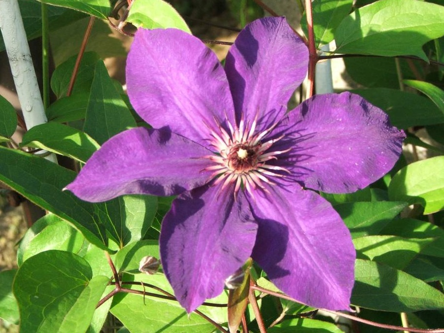 Clematis cultivars `Warszawska Nike`